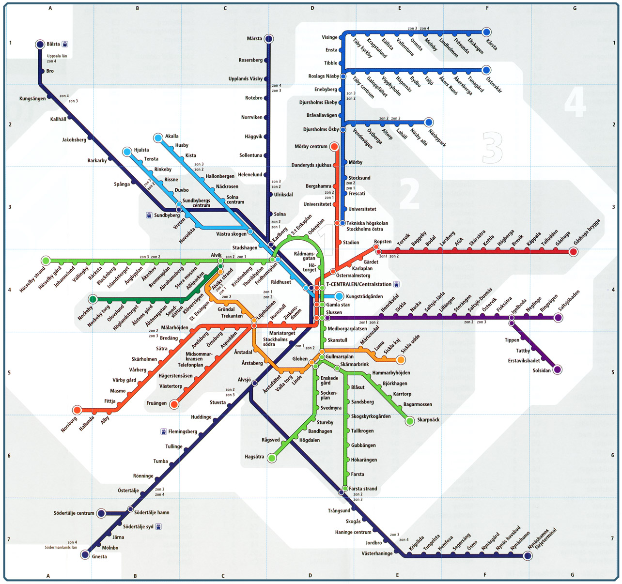 中文（中国大陆）: 斯德哥尔摩地铁图，修改自斯德哥尔摩地铁站信息栏